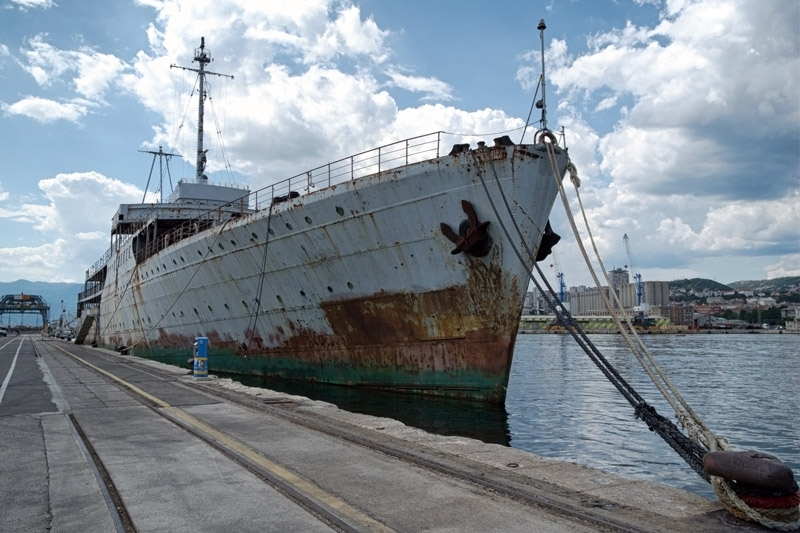 Riječka luka Galeb